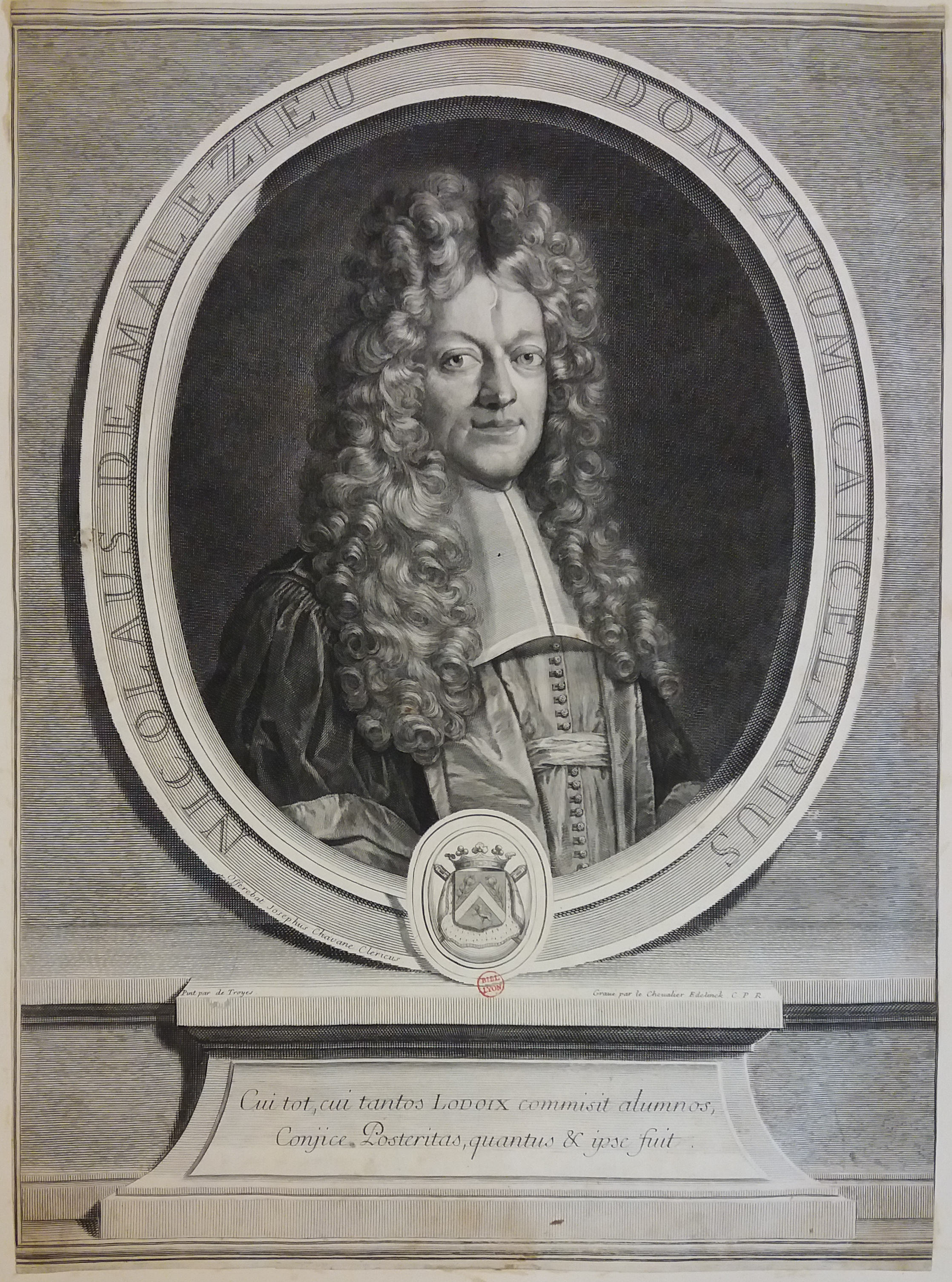 Portrait de Nicolas de Malezieu (1650-1727), chancelier de la principauté des Dombes Bibliothèque municipale de Lyon, cote : Est Coste 14372.